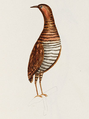 Norfolk Island Rail (Gallirallus sp.)